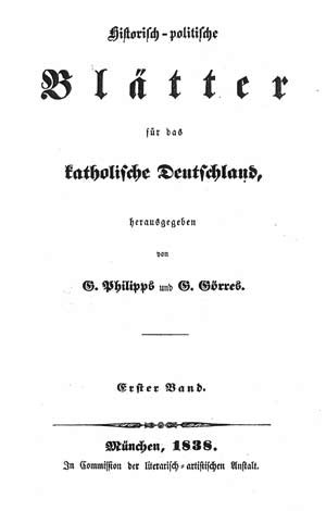 Titelblatt der Zeitschrift Historisch-politische Blätter für das katholische Deutschland (Erster Jahrgang von 1838)